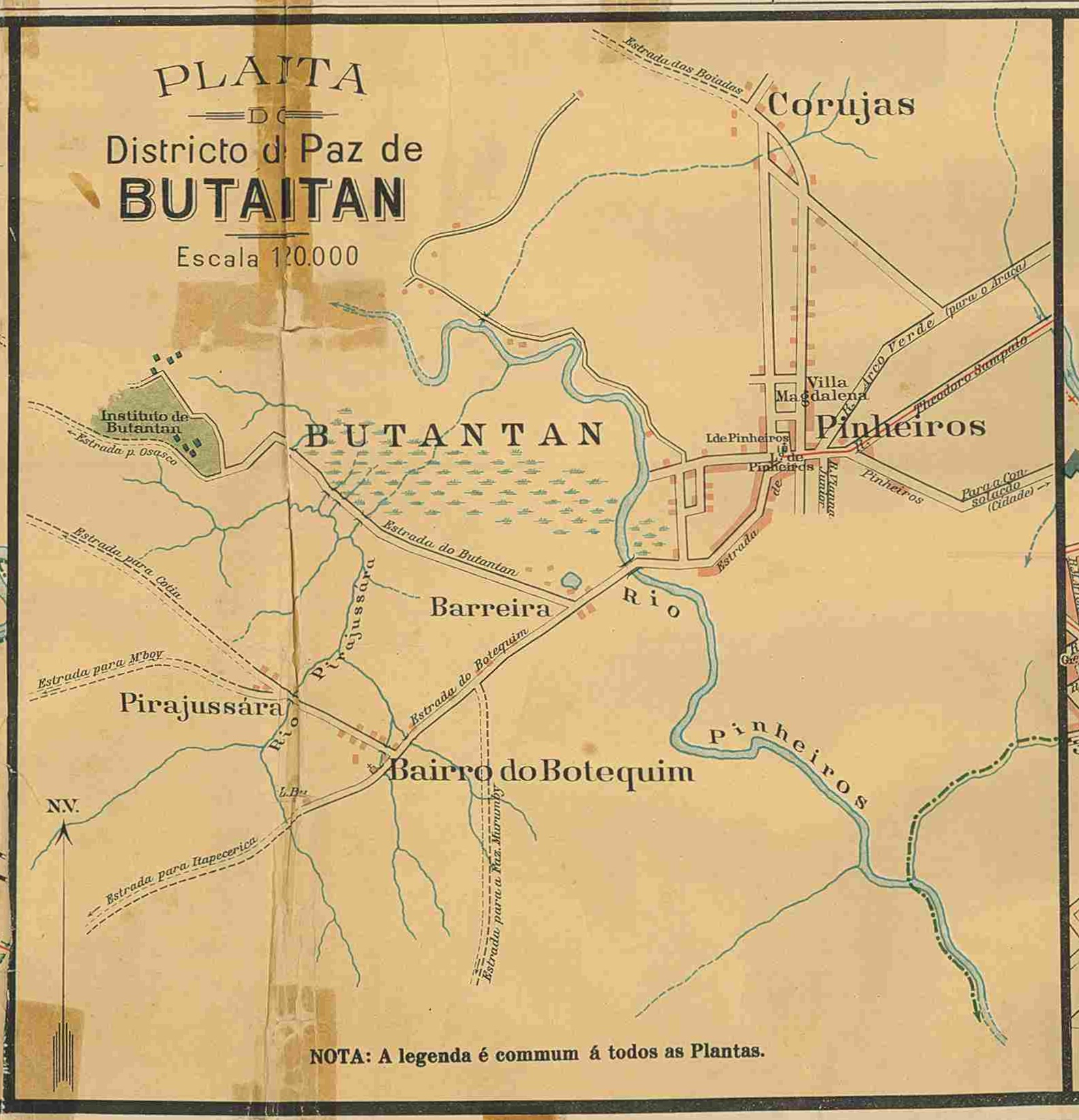 Bairros de Pinheiros e Butantã na Planta Geral da Cidade de São Paulo (1913), por Alexandre Mariano Cococi e Luiz Fructuoso L. Costa